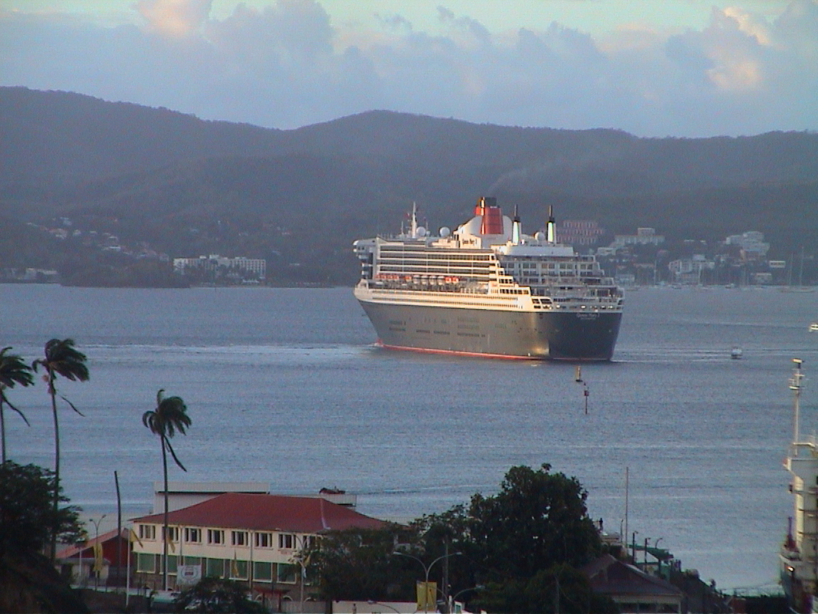 Queen May 2, paquebot transatlantique britannique, dans la baie de Fort-de-France, le 2 mars 2004, vers 5 heures du matin heure locale